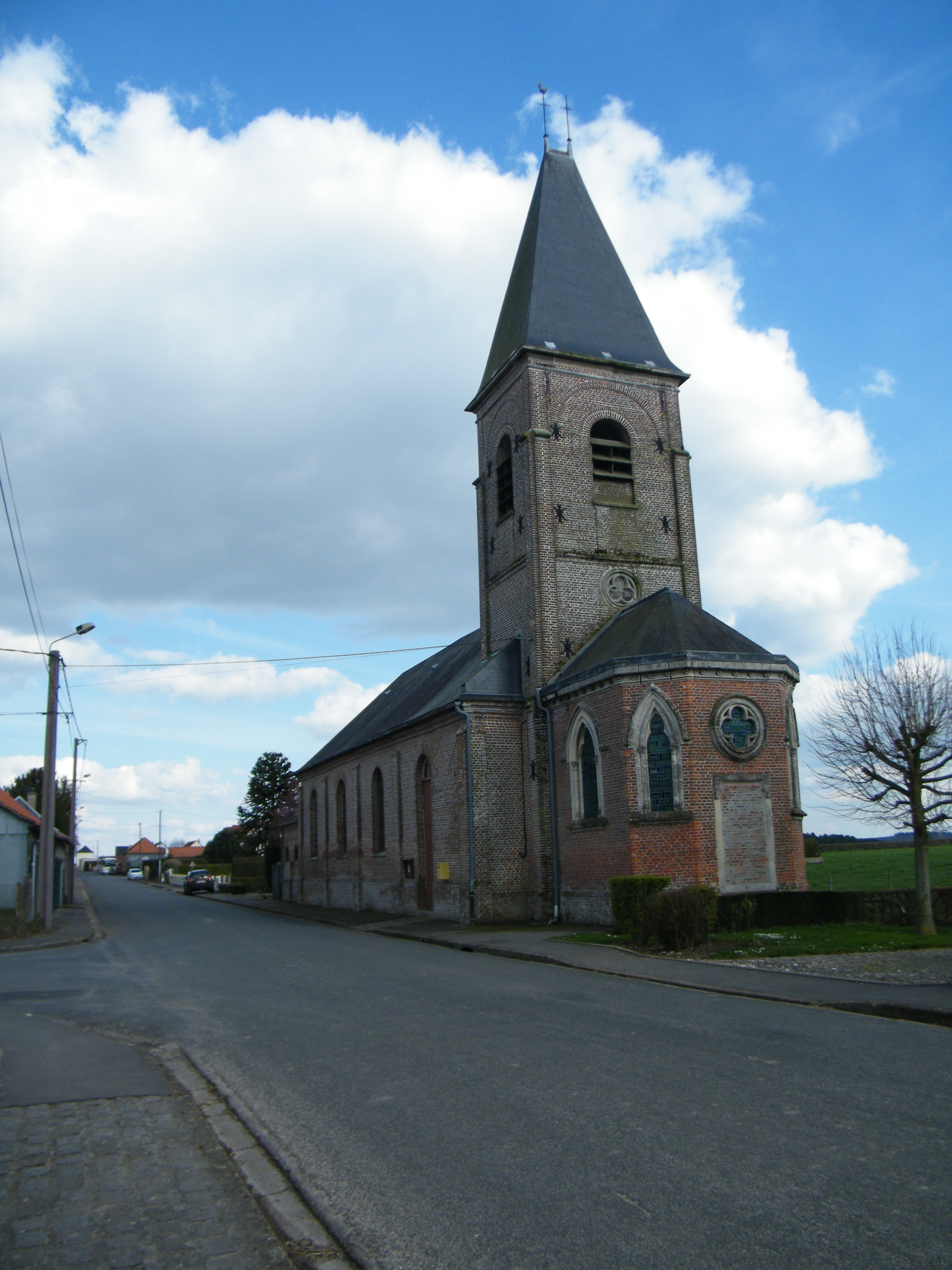 L'église, côté clocher.